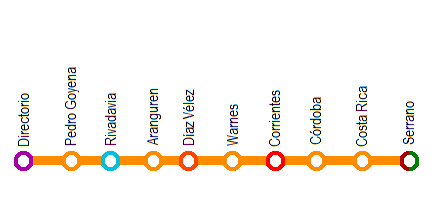 Progetto Linea I Buenos Aires